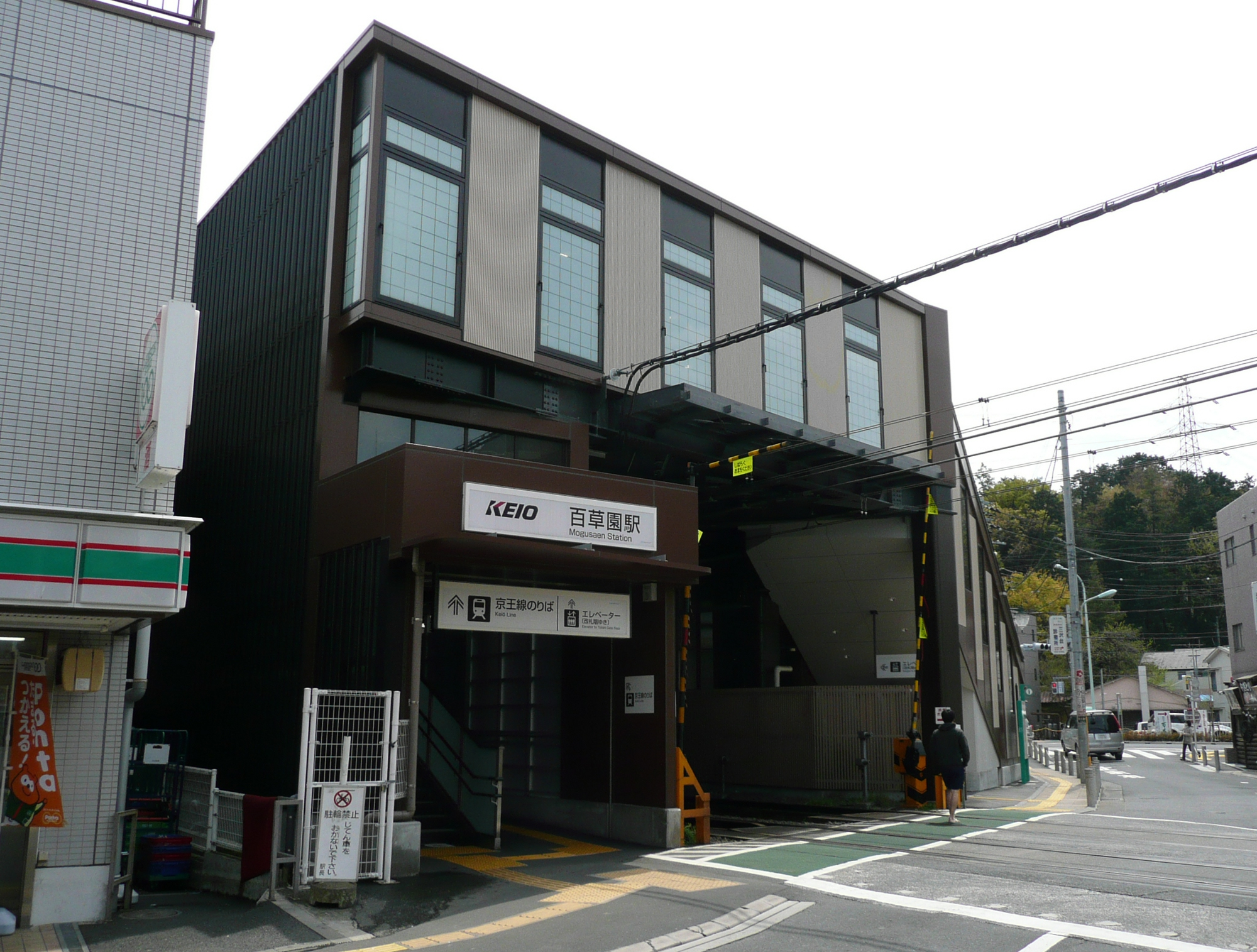 百草園駅北口